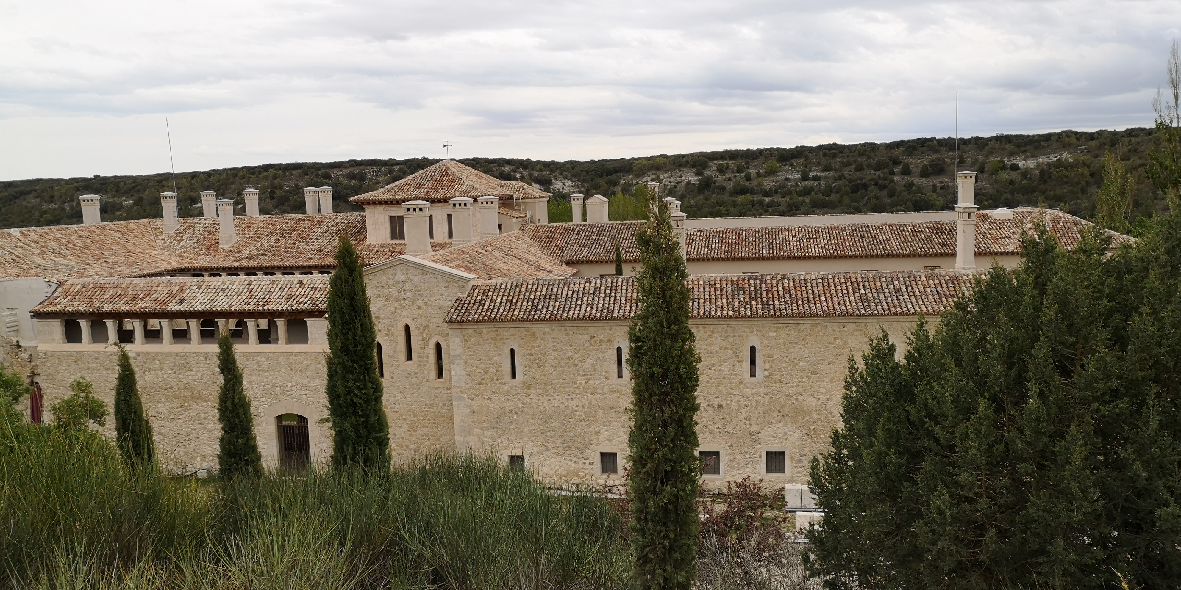 Monasterio de San Pelayo, en Cevico Navero, Palencia (España)